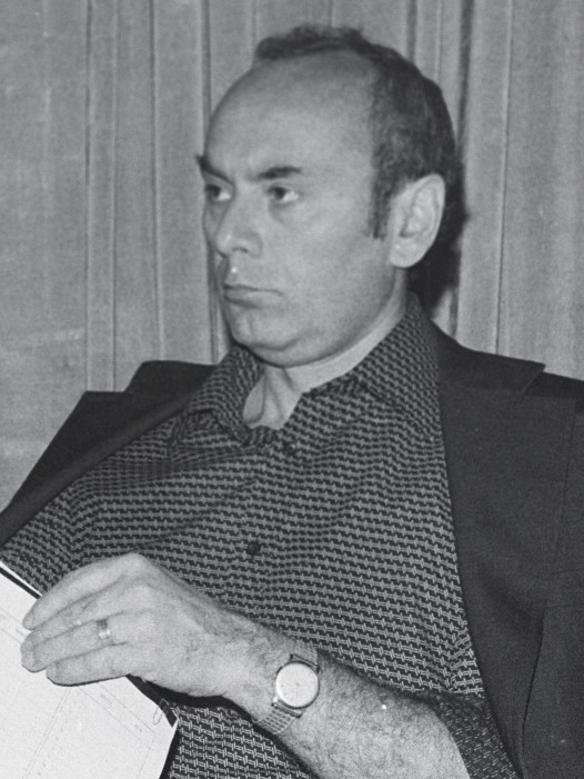 Lajos Portisch, während des Interzonenturnieres 1979 in Rio de Janeiro.